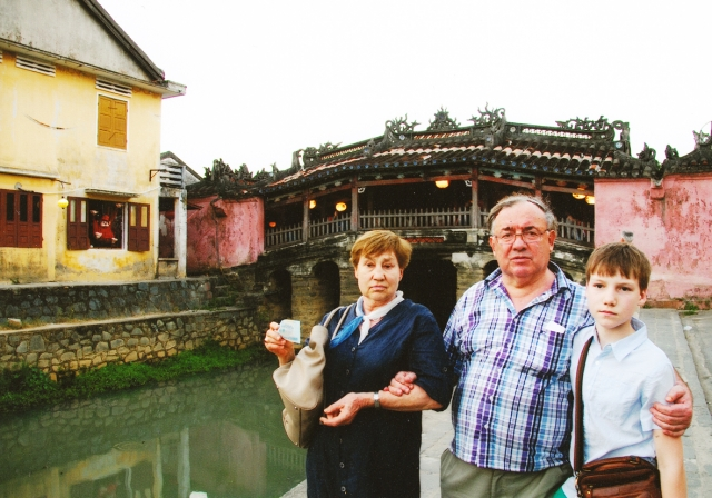 Antanas Trumpa su žmona Ledina ir anūku Martynu